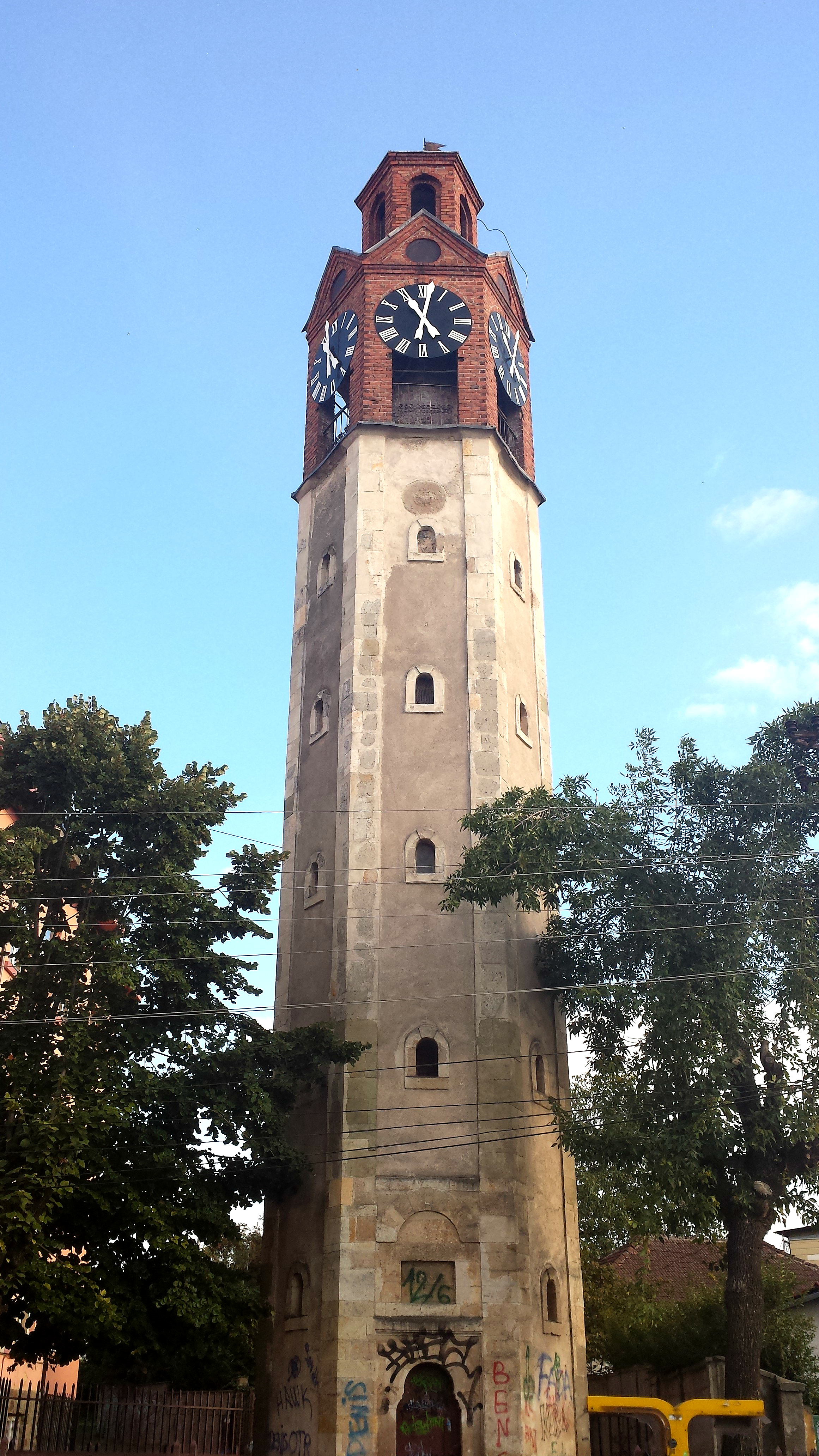 Sahat Kulla e Sahatit